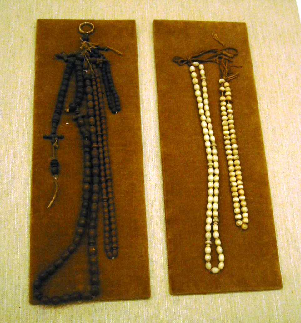 Hasekura rosaries. Sendai museum. Personal photograph.